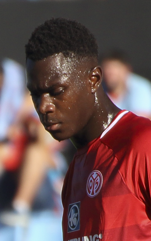 Presentación RC Celta - Temporada 18/19